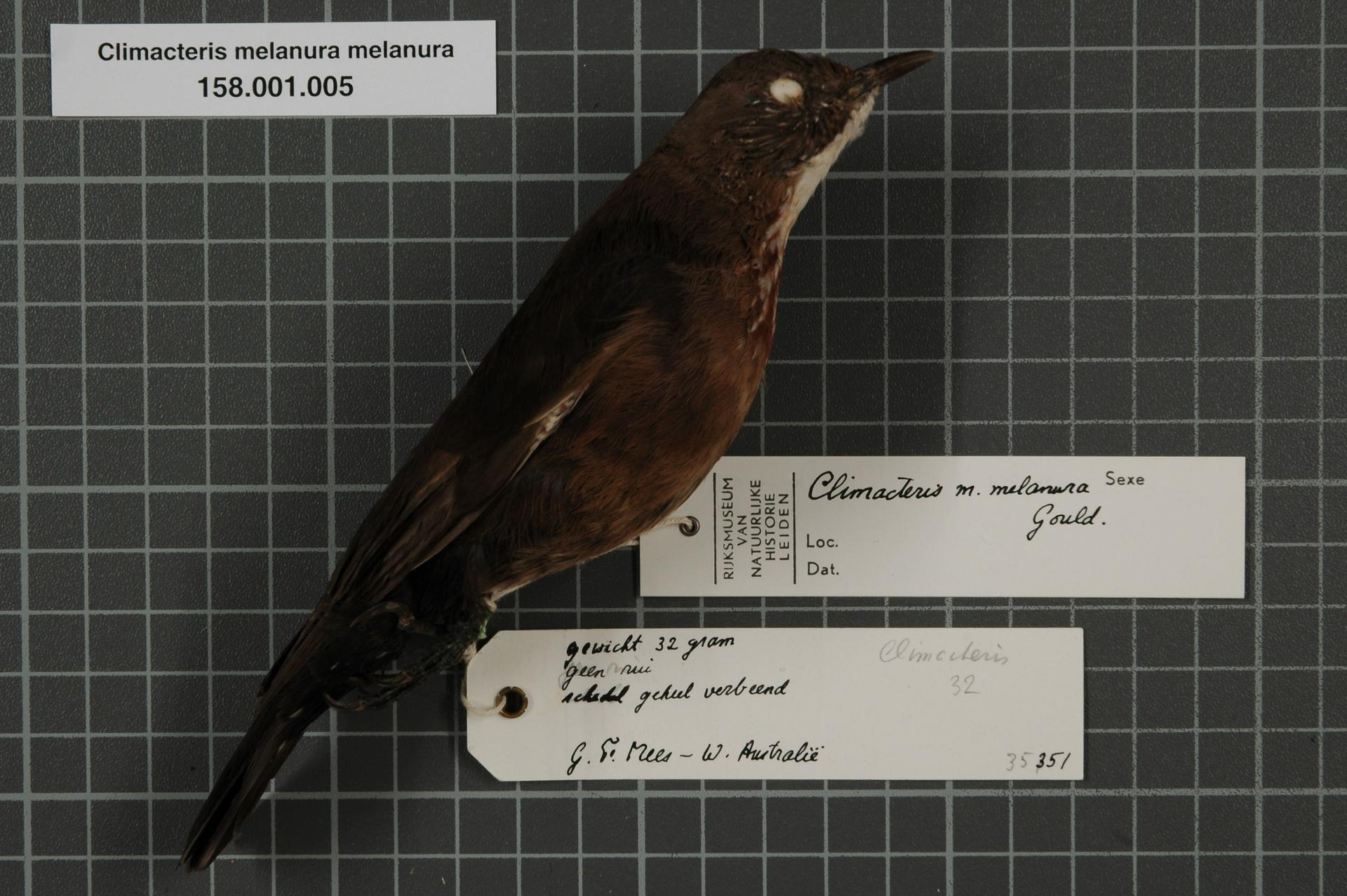 Climacteris melanura melanura Gould, 1843